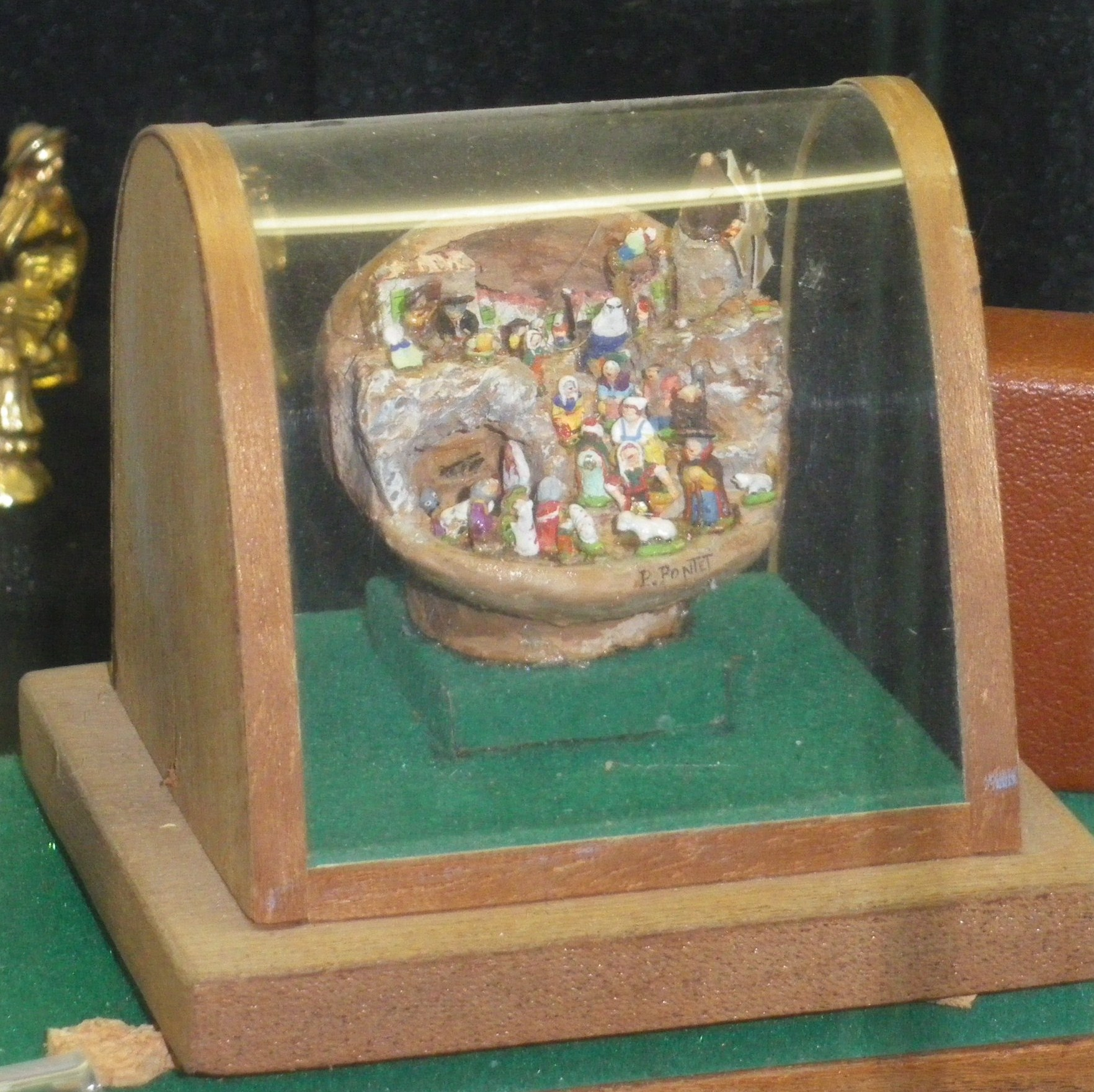 plus petite crèche du monde, dans une coquille de noix